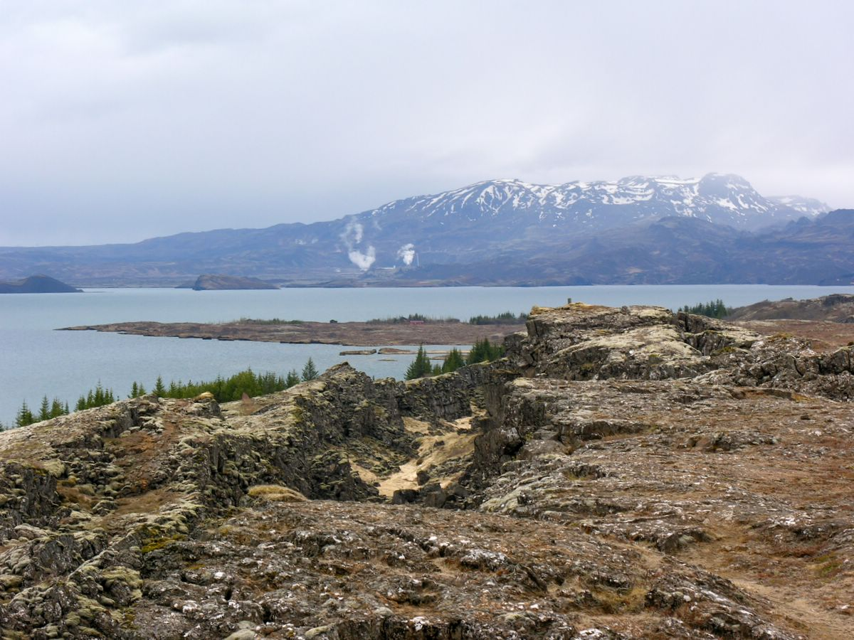 Þingvellir, Iceland